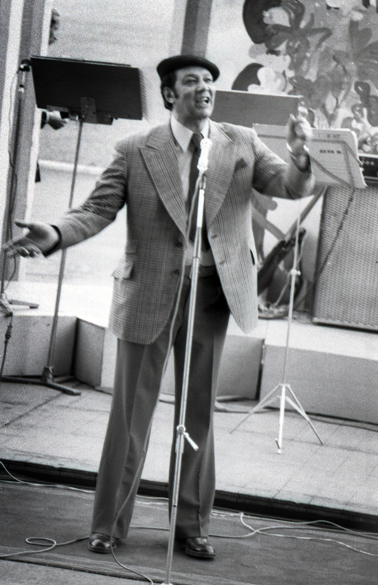 Eino Baskin 74